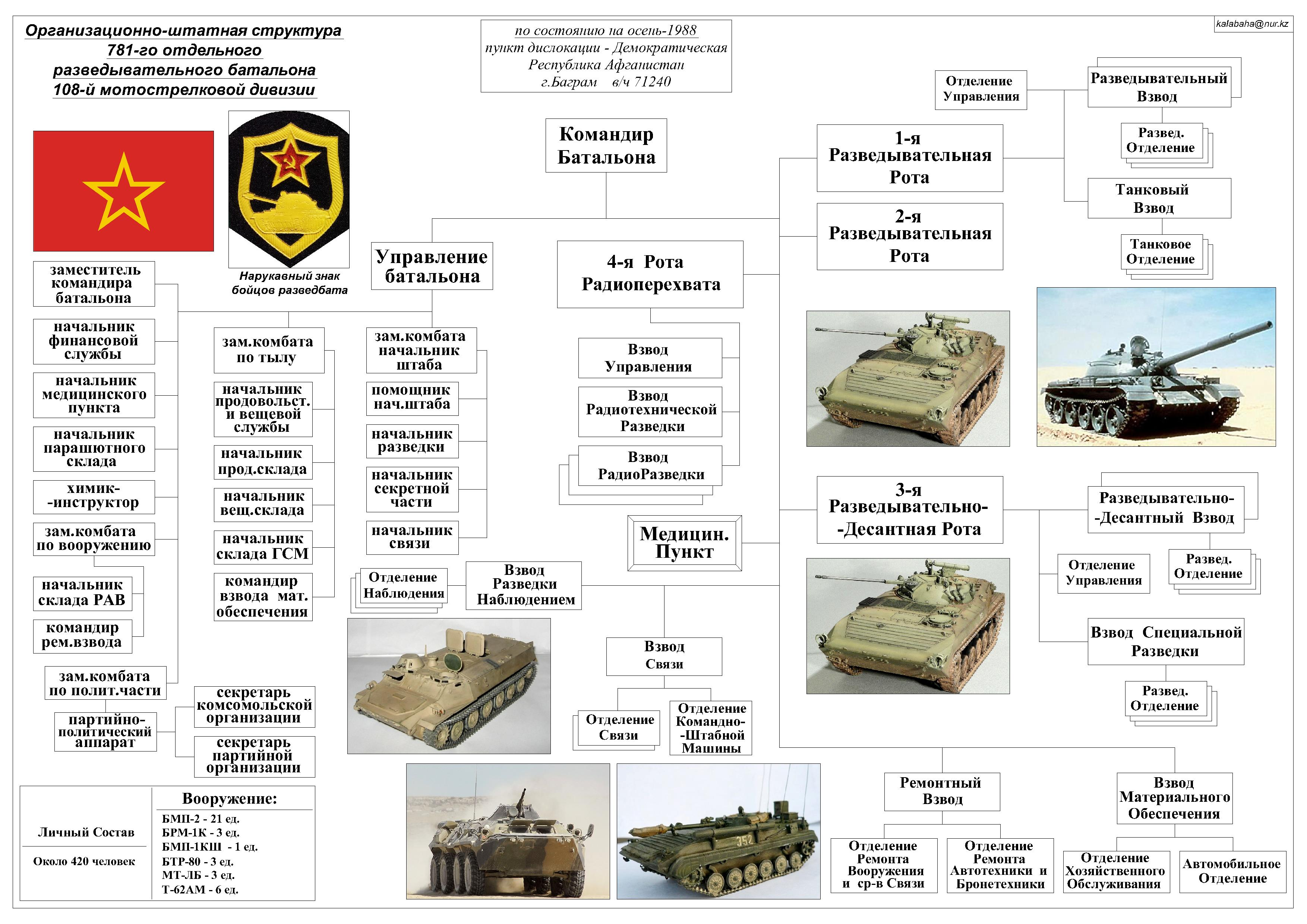 Организационно-штатная структура 781-го отдельного разведывательного батальона на осень-1988. Схема составлена по материалам Бешкарёва Александра Ивановича "ПЕРЕЧЕНЬ СОВЕТСКИХ ВОИНСКИХ ЧАСТЕЙ В АФГАНИСТАНЕ (1979-1989 гг.)" и по материалам сайта 108-й мсд. Отчерчено в AutoCAD 2005 собственноручно. Источник данных